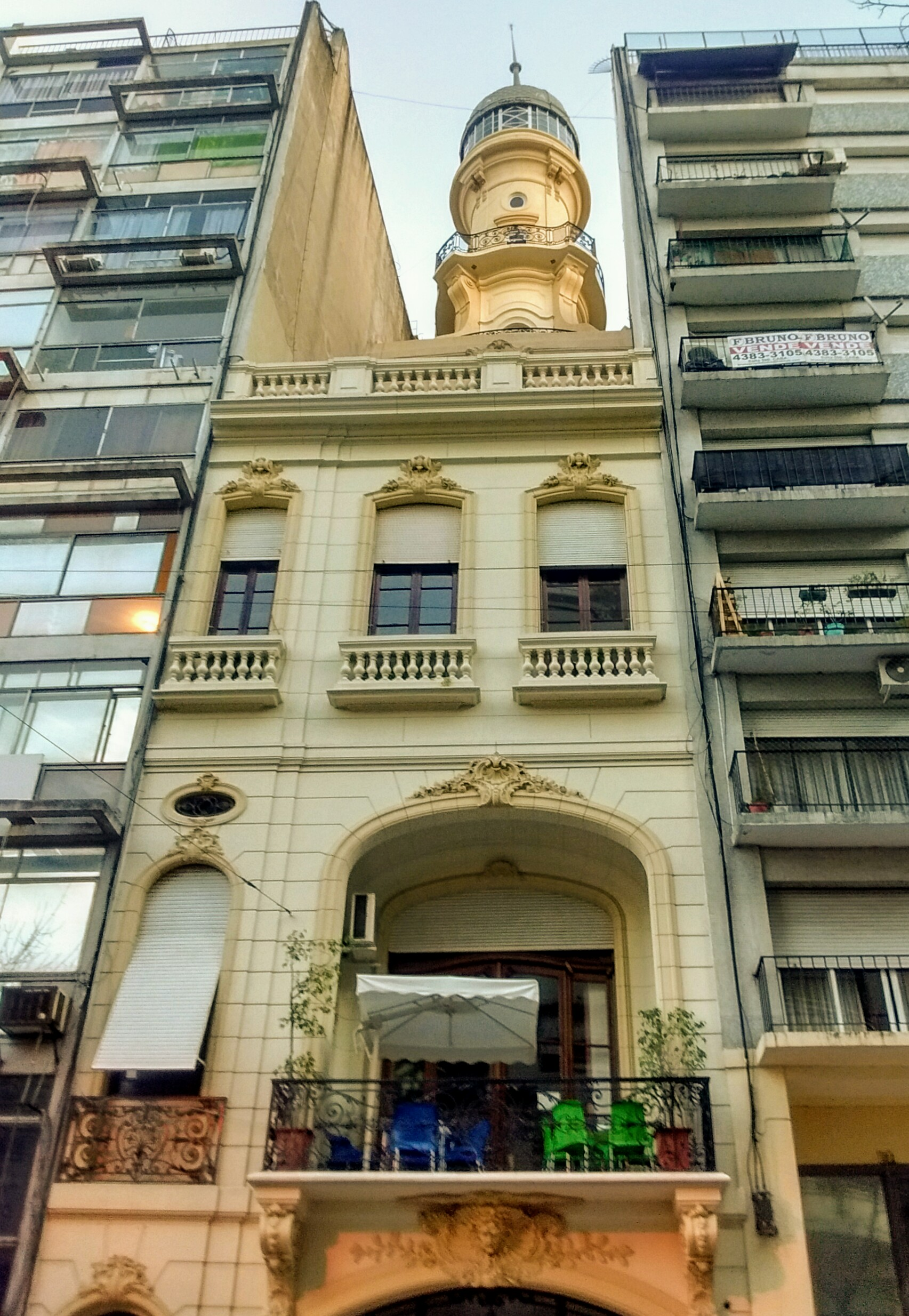 Palacio Dassen, actual Asociación Argentina de Actores, Adolfo Alsina n°s 1762/1764/1766, Buenos Aires, Argentina.